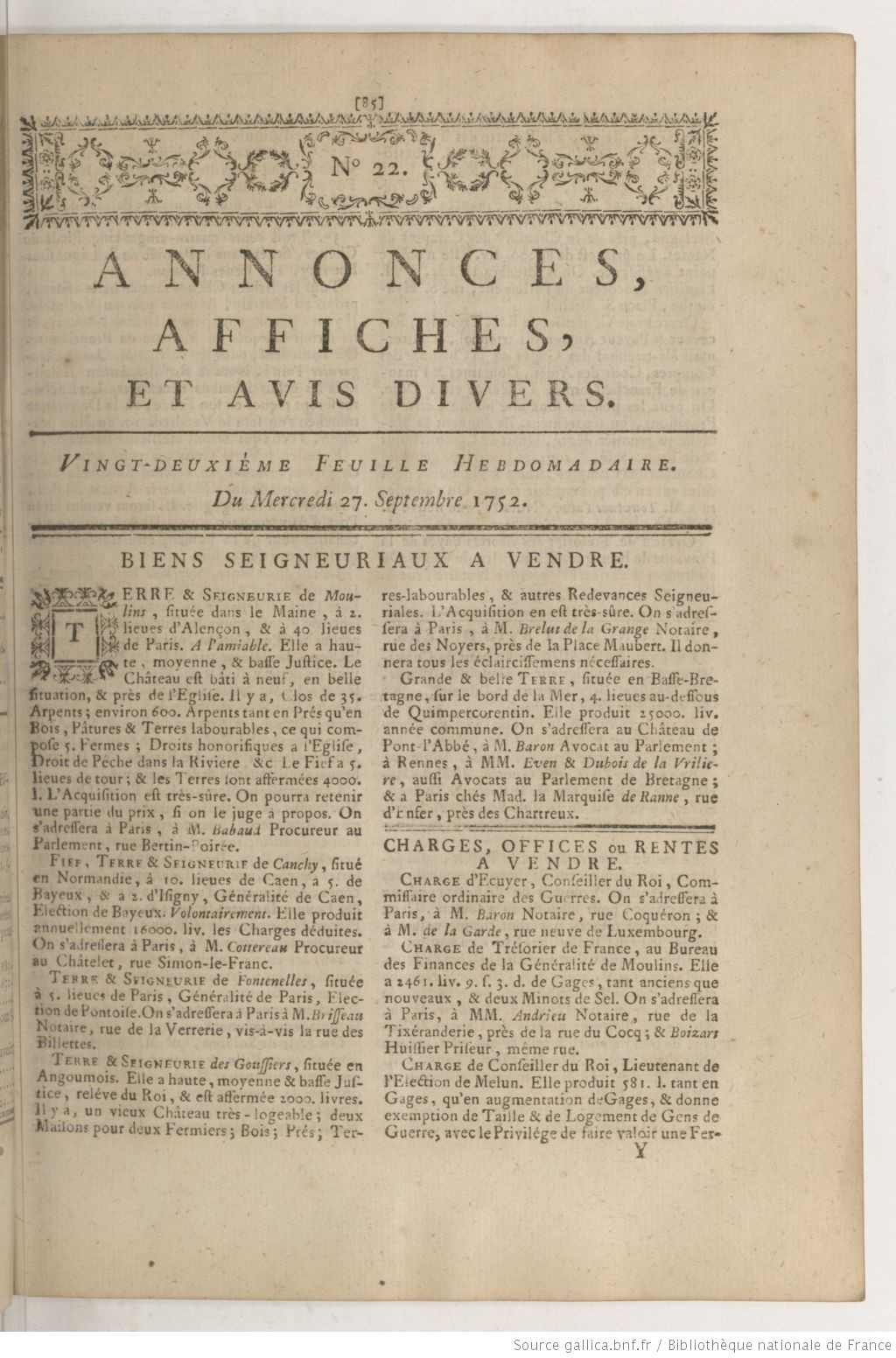 Affiche de 1752 annonçant la vente des terres de Canchy